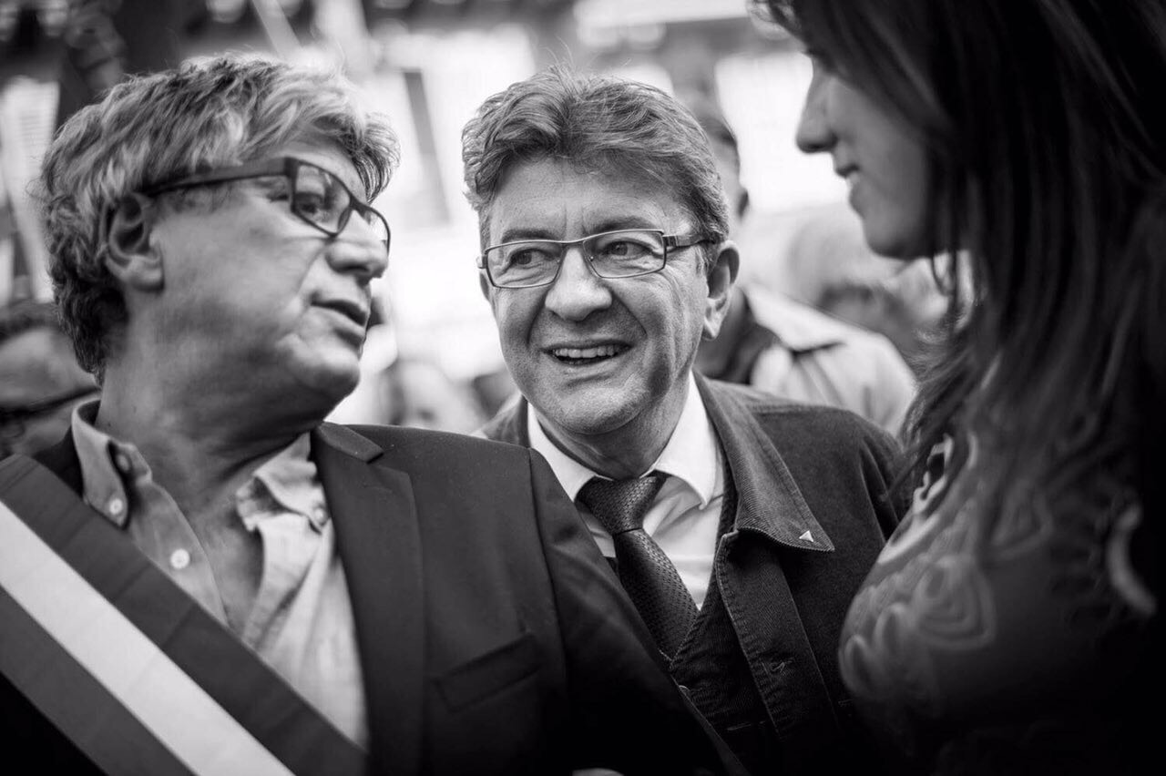 Éric Coquerel et Jean-Luc Mélenchon - Manifestation des syndicats contre les ordonnances de la Loi Travail